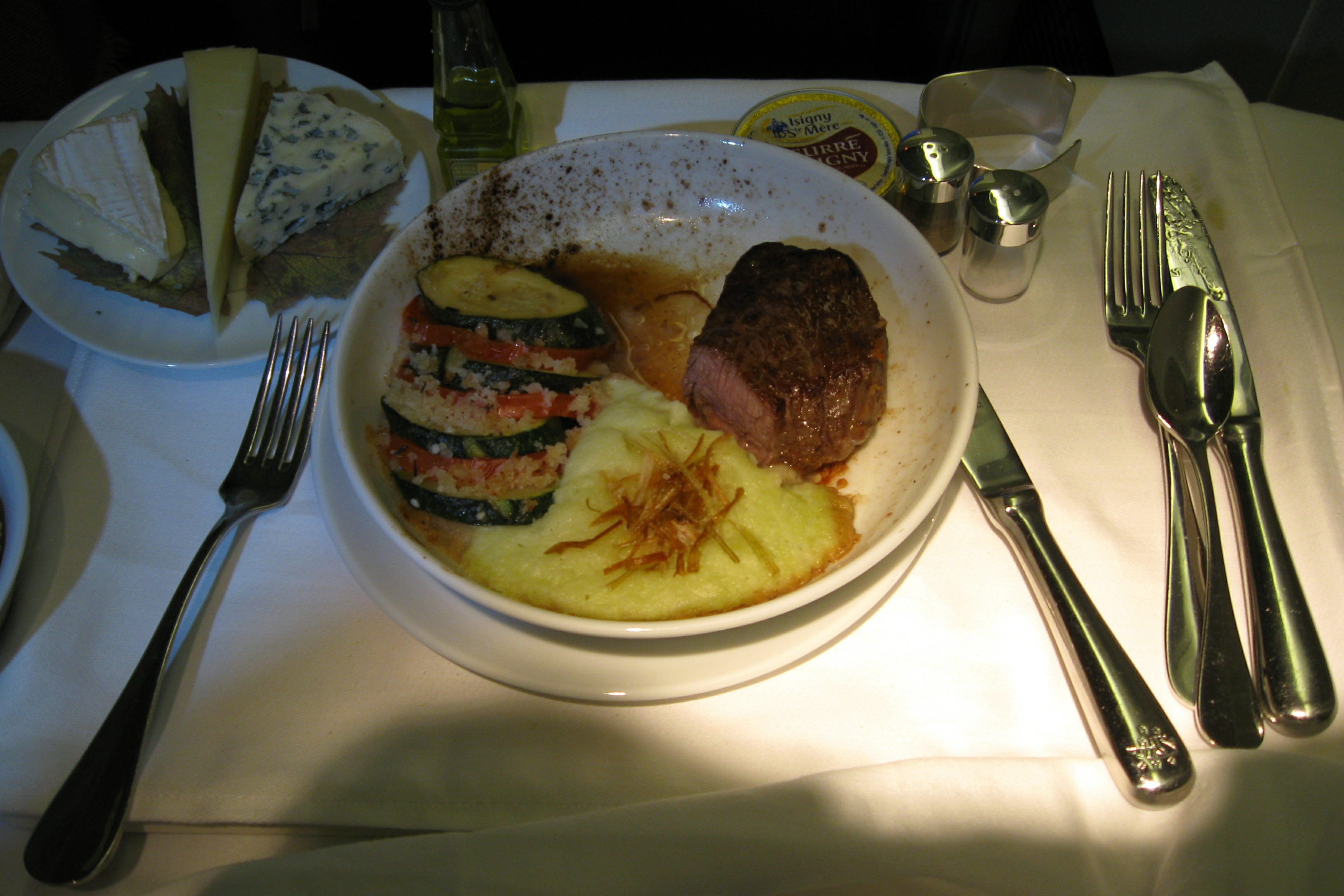 MSN 32847 B777-328 ER AIR FRANCE FLIGHT JFK-CDG DINNER IN BUSINESS CLASS